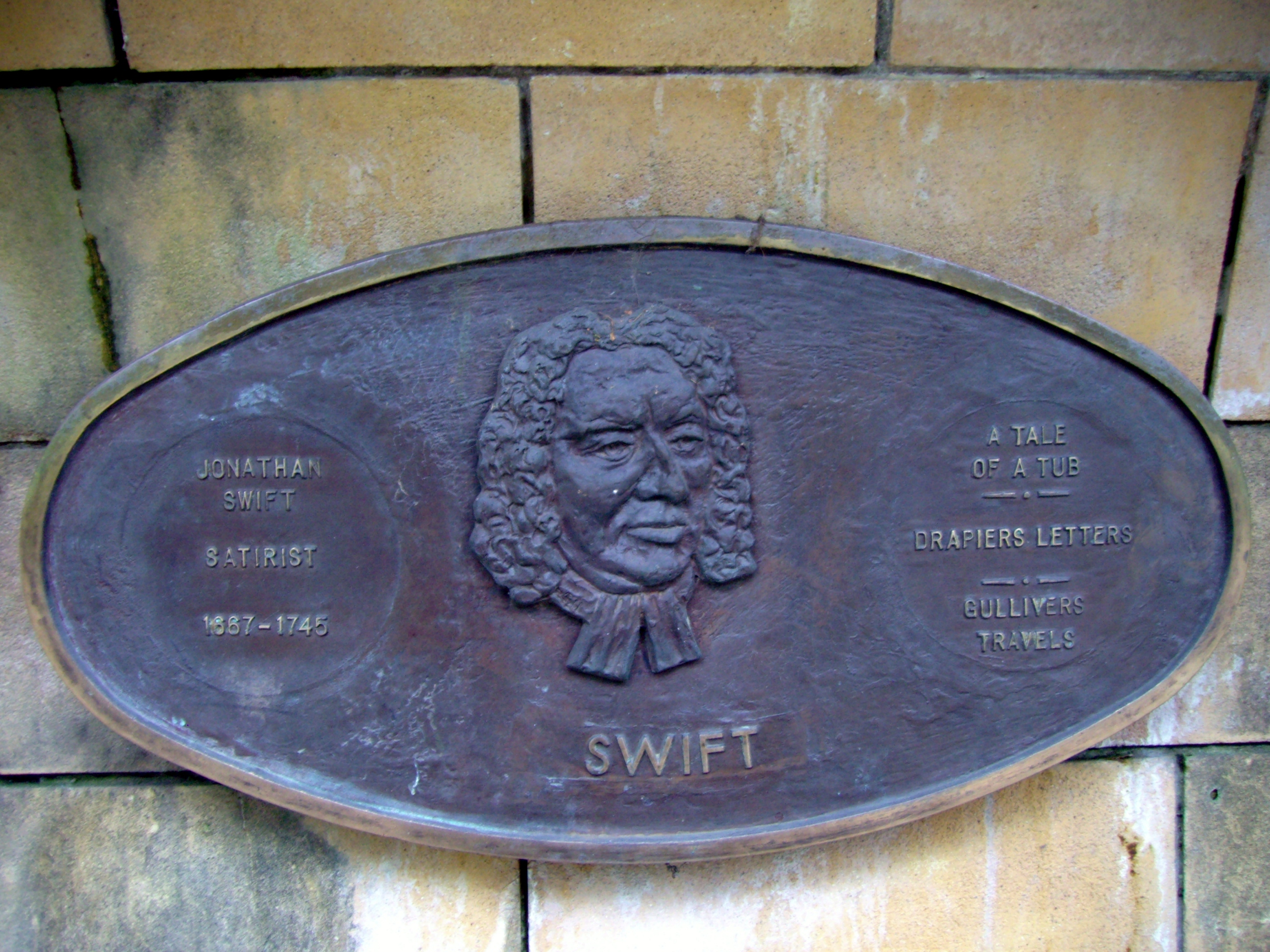 Jonathan Swift (1667–1745), irischer Dichter; Plakette im Saint Patrick's Park, Dublin, dort angebracht anlässlich der Dublin Millennium 988–1988 Literary Parade